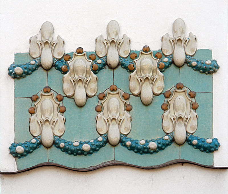 Villa Vojcsik (Vienna, Austria) - Otto Schönthal